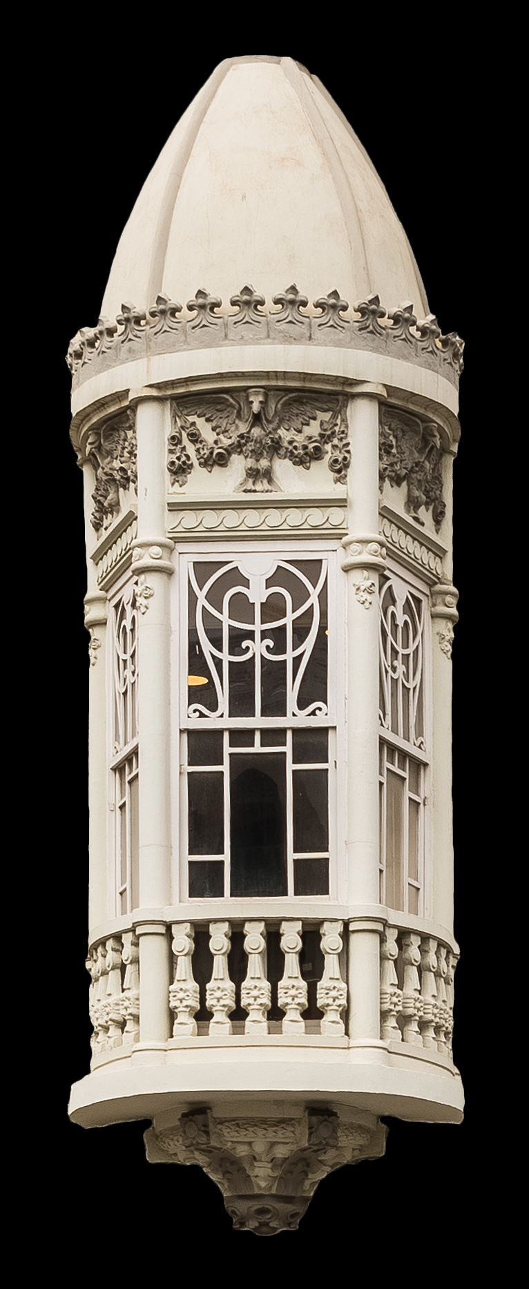 Mirador de la fachada de la Casa de Salomón Cohen